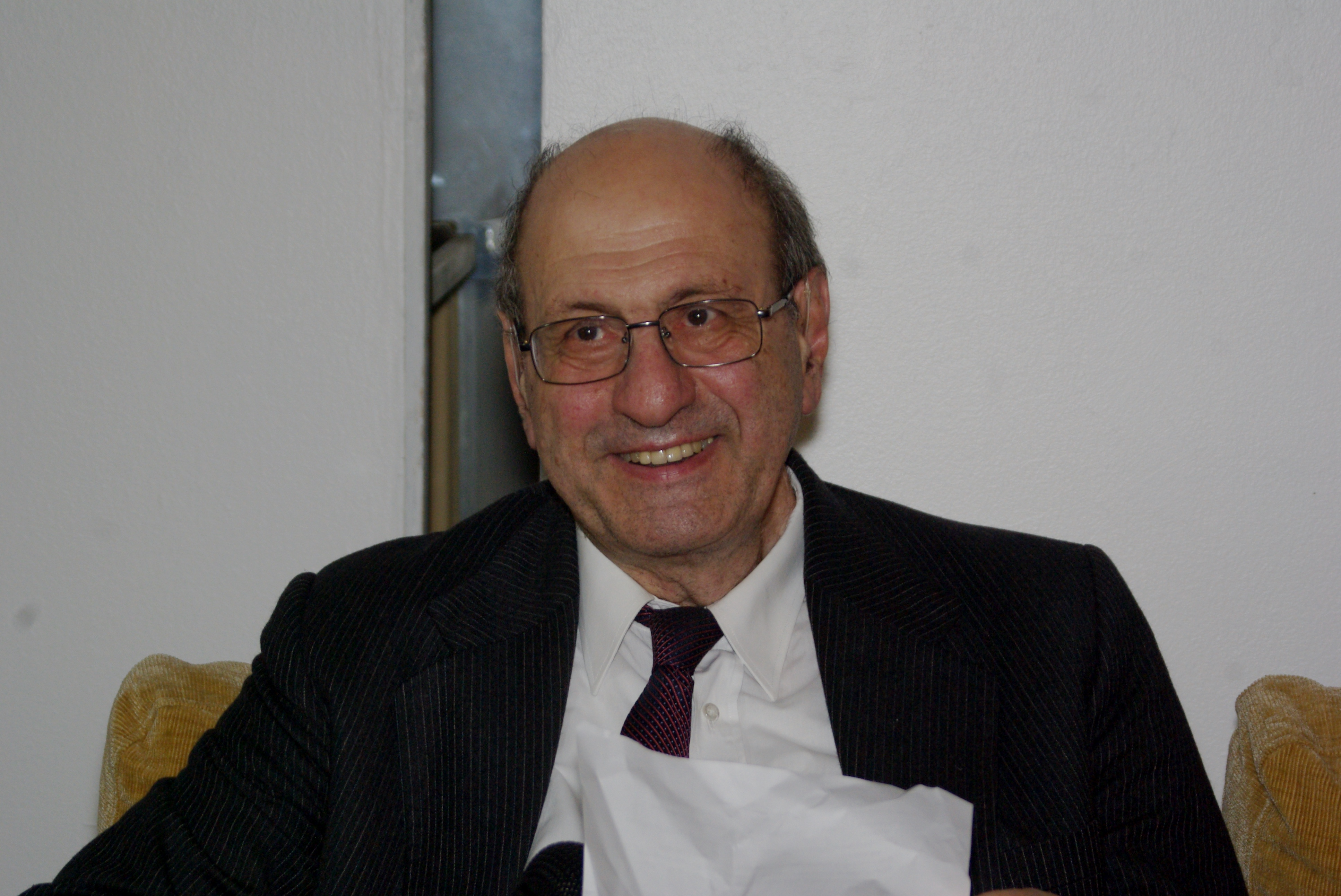 El abogado chileno José Zalaquett en la Feria Internacional del Libro de Santiago 2015